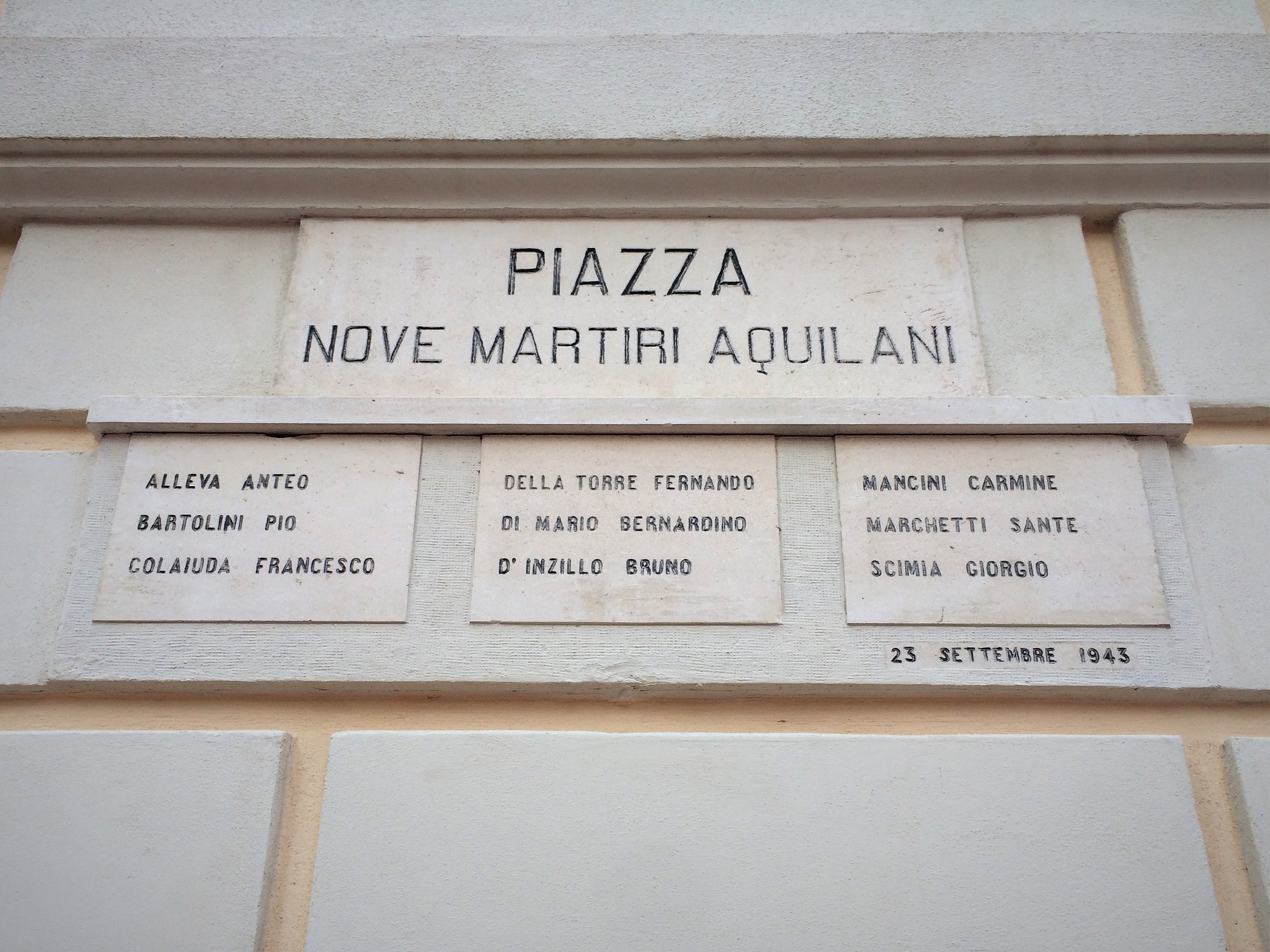 Monumento ai IX Martiri nell'omonima piazza, in L'Aquila.